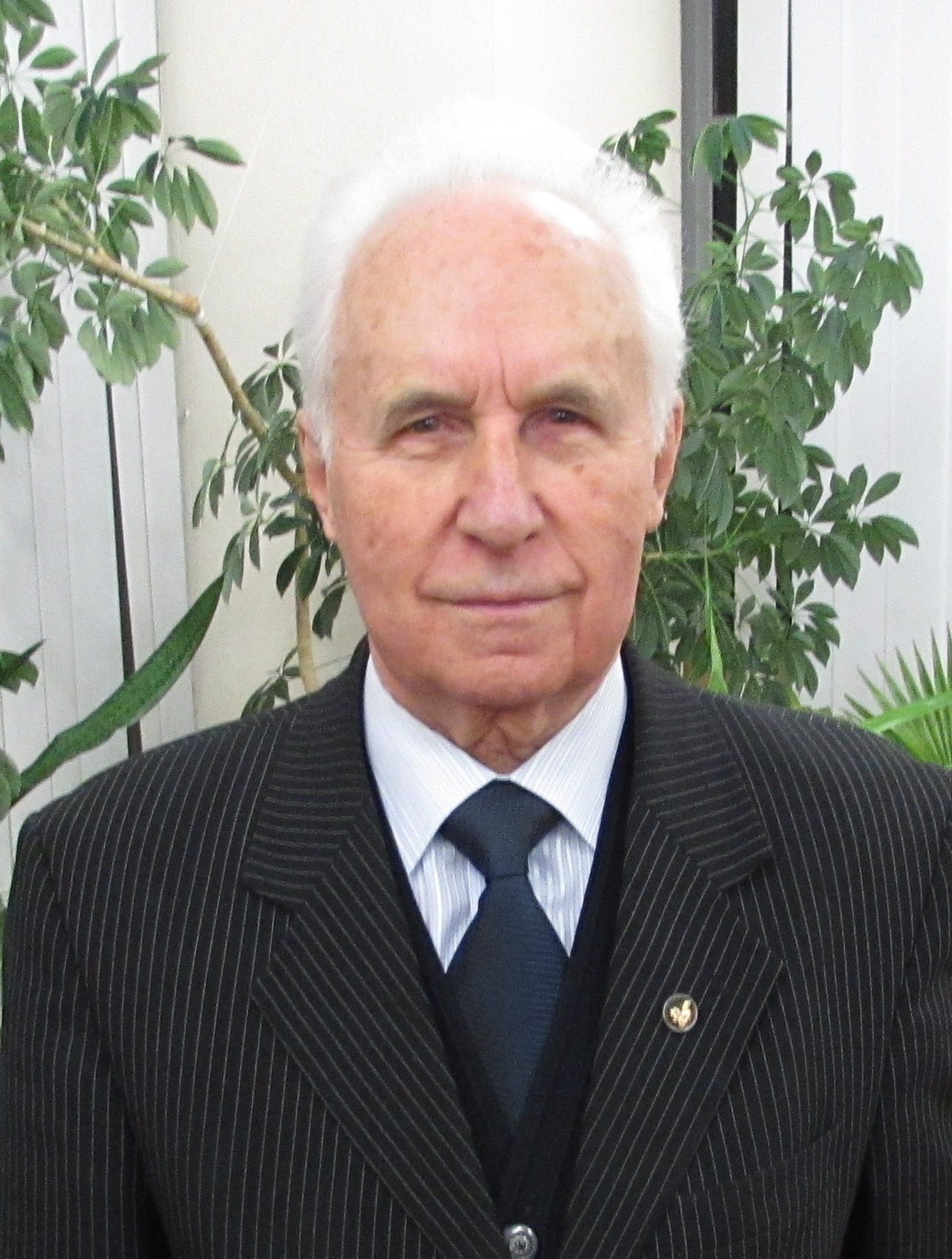 Академік Георгій Гайко в Будинку кіно, Київ, 21.01.2017